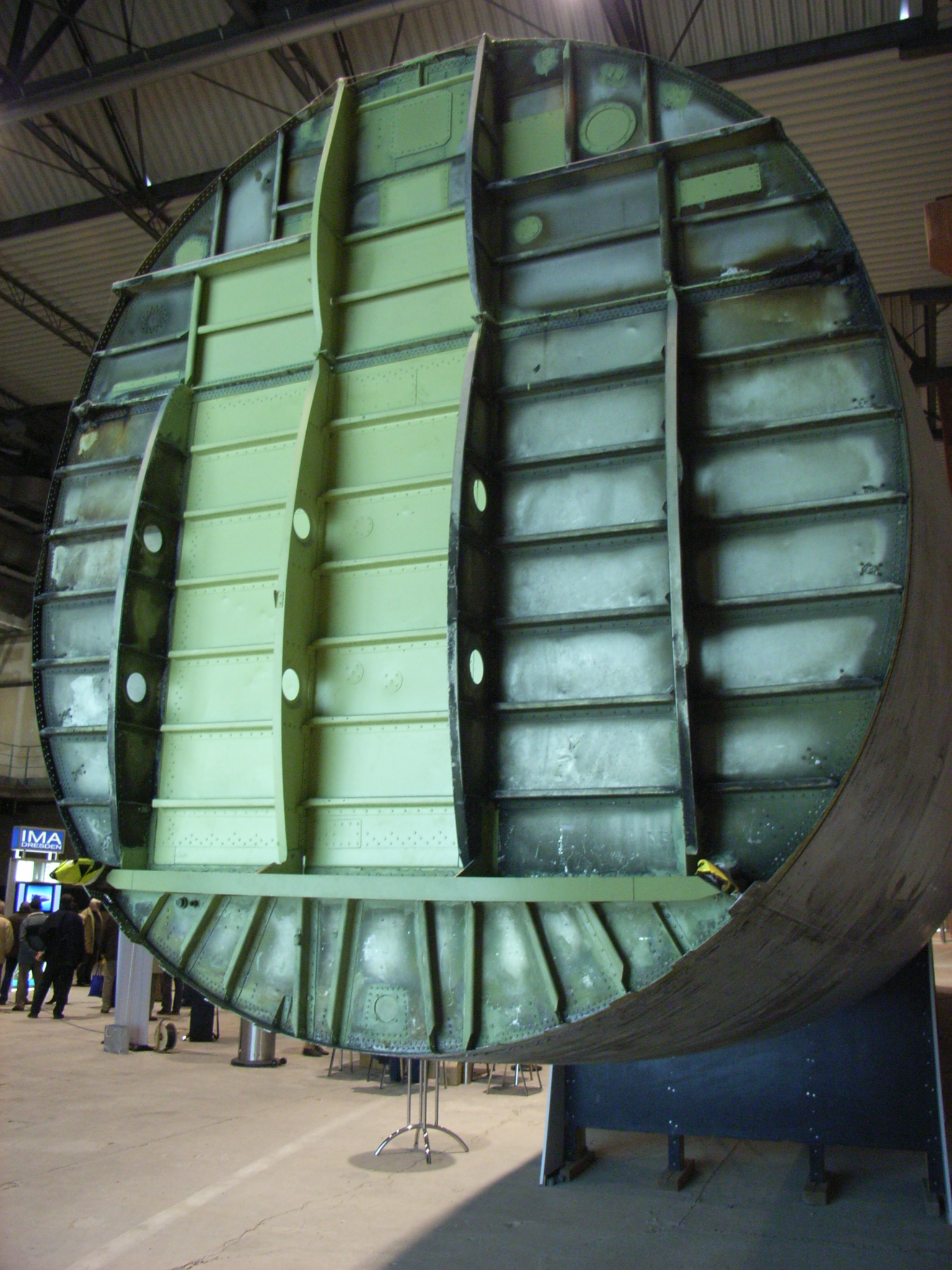 Druckschott am Heck der 152